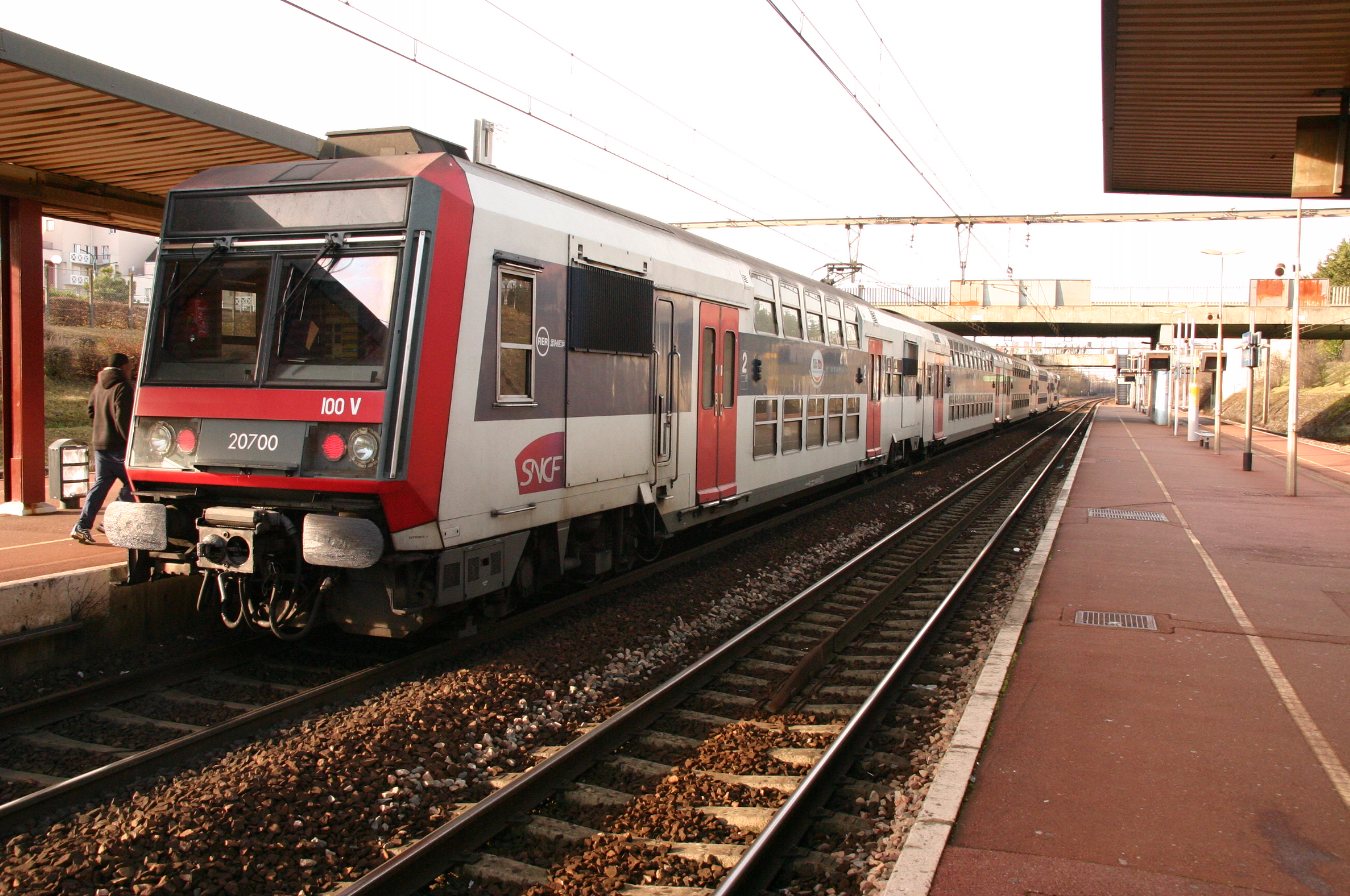 La Gare de Le Mée, Le Mée-sur-Seine , département de la Seine-et-Marne, France